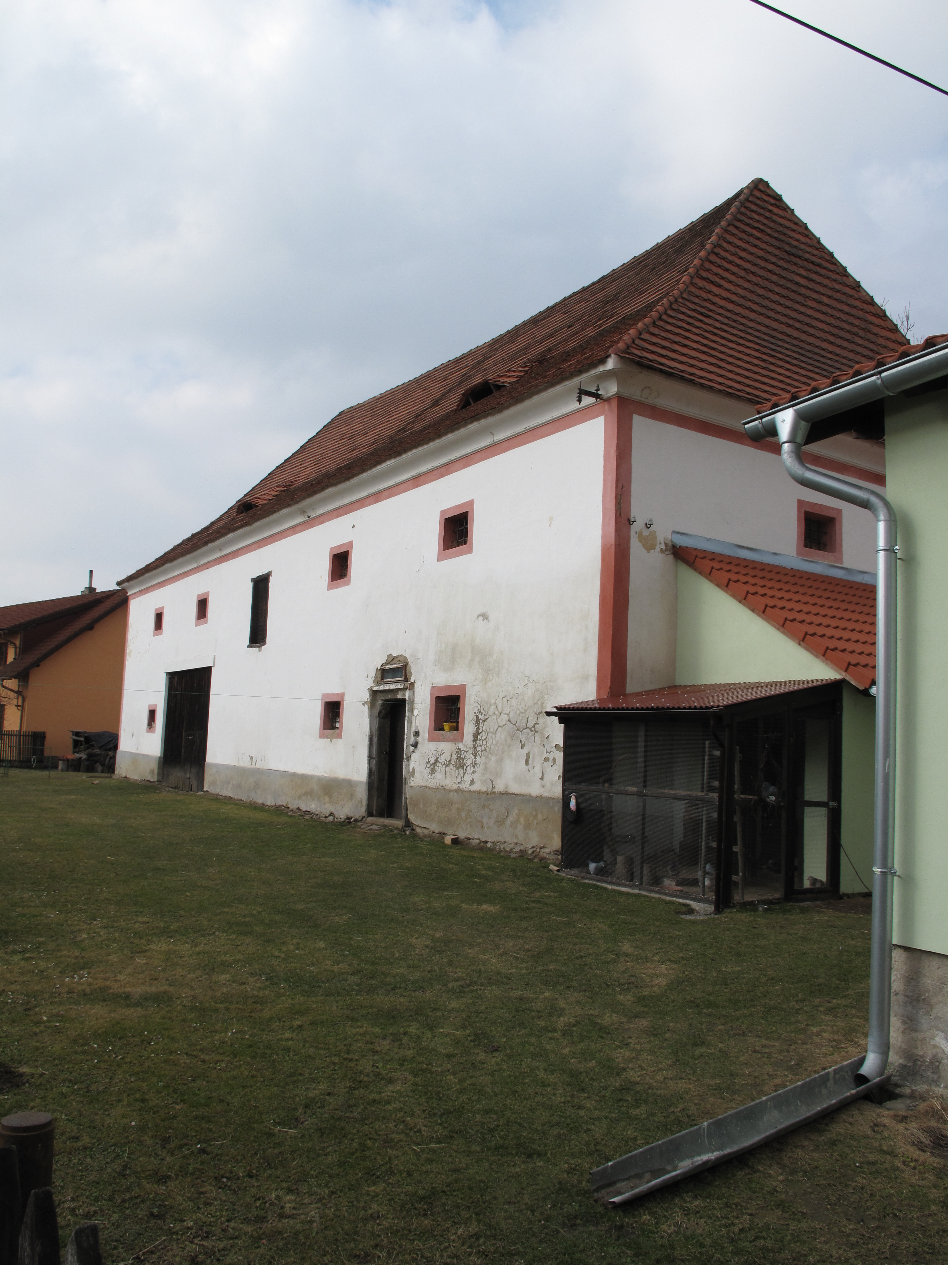 Sýpka v Želibořicích. Okres Prachatice, Česká republika.